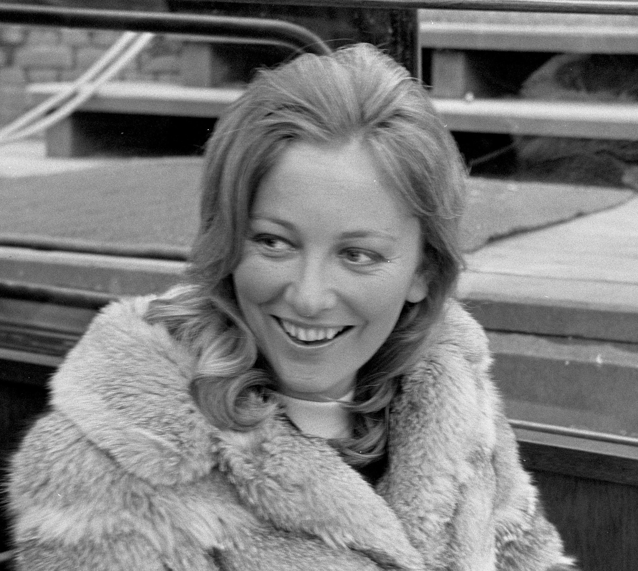 Prinses Paola en Prins Albert van Belgie in Amsterdam Prinses Paola in rondvaartboot